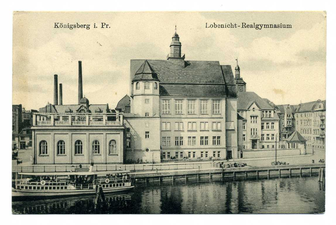 Königsberg